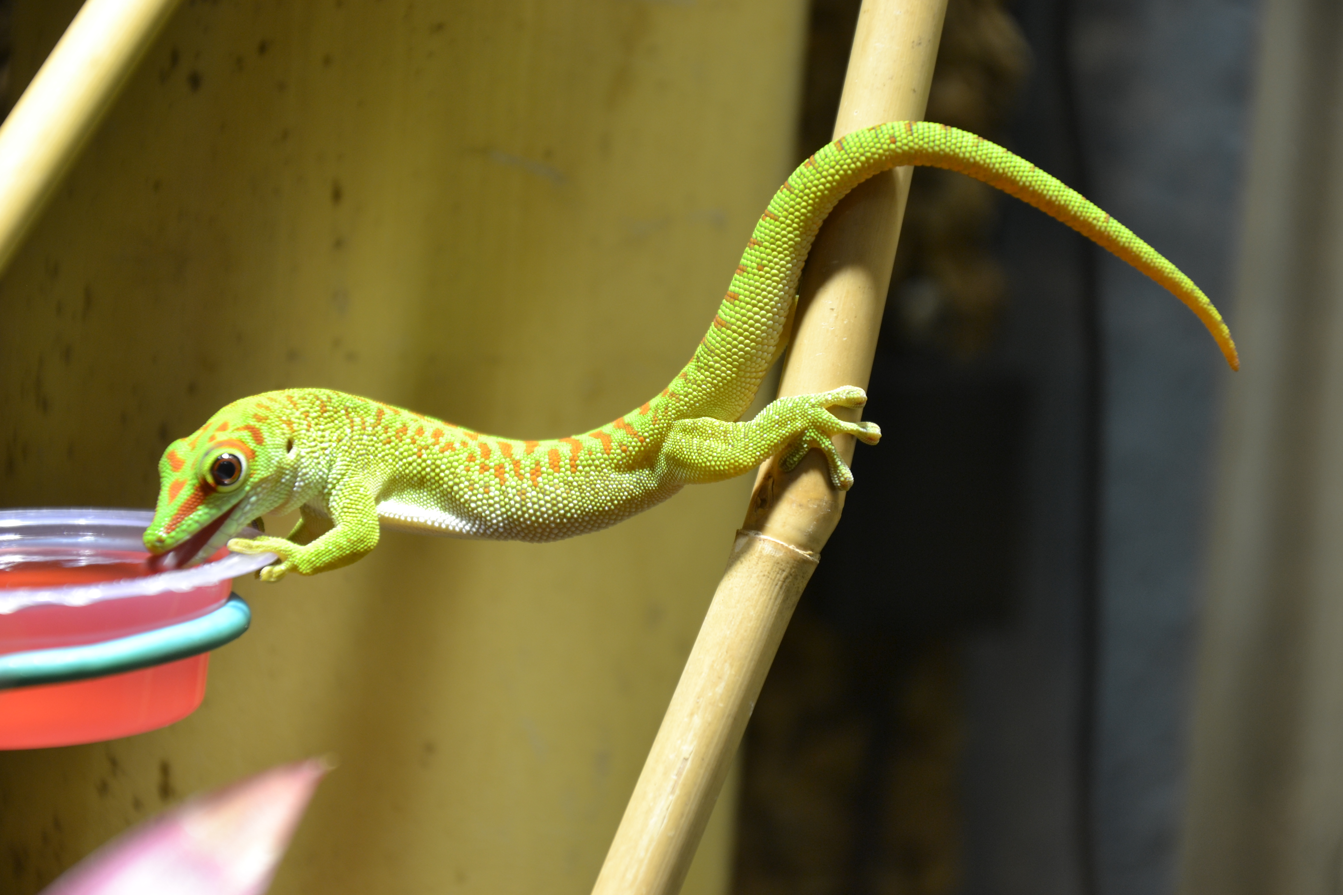 Sehr sportlich